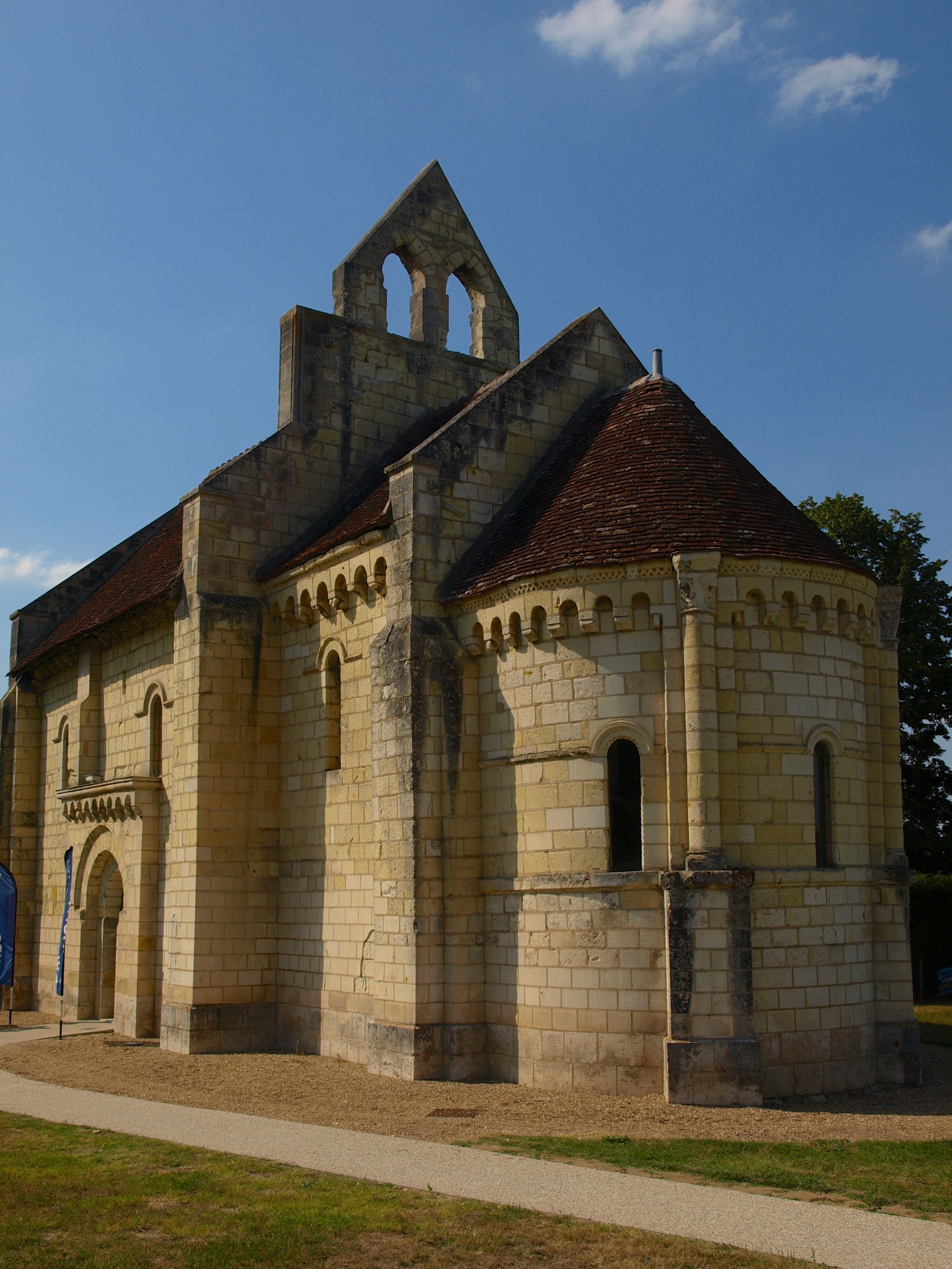 La chapelle Saint Lazare de Noyers sur Cher dans le Loir et Cher .